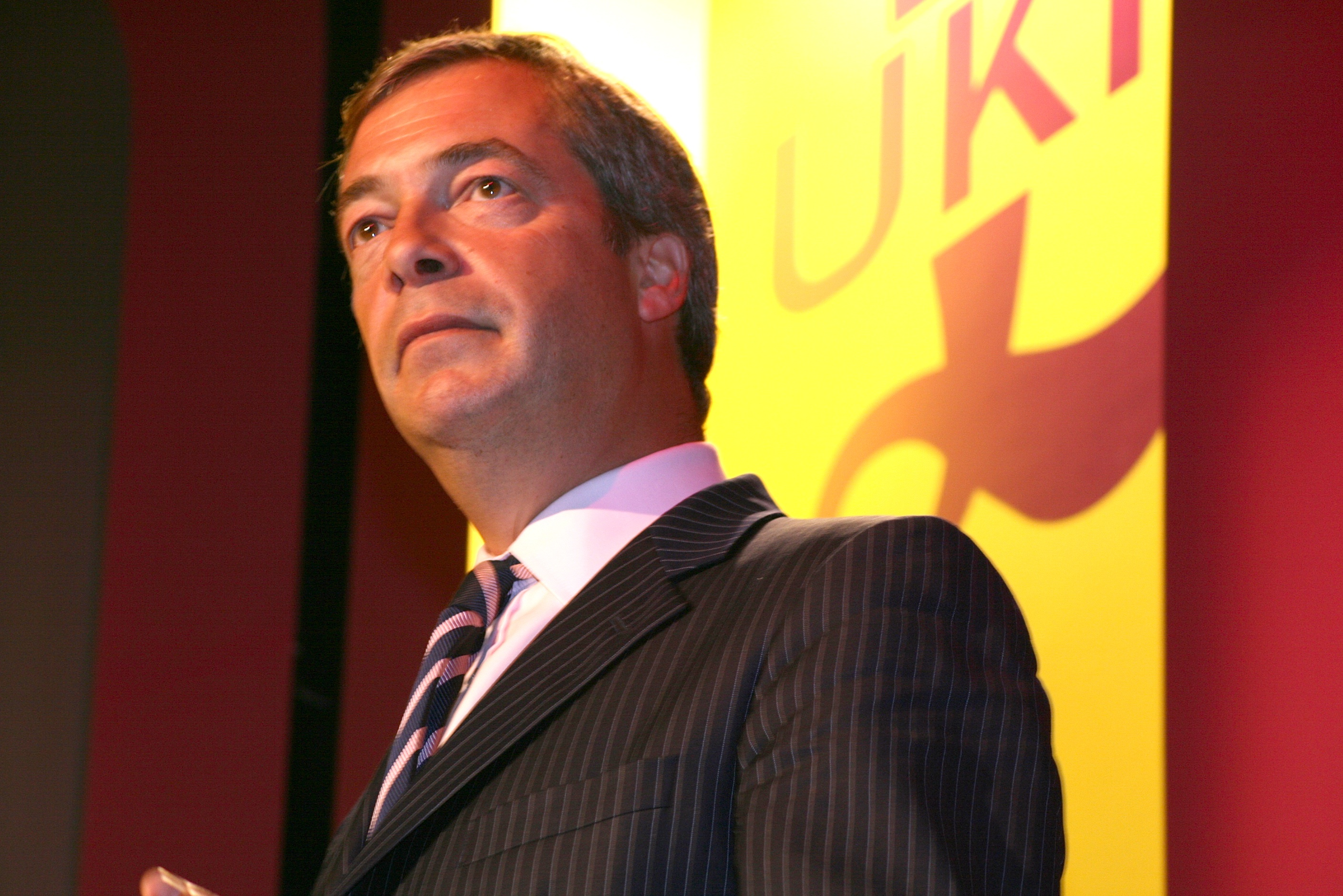 Nigel Farage